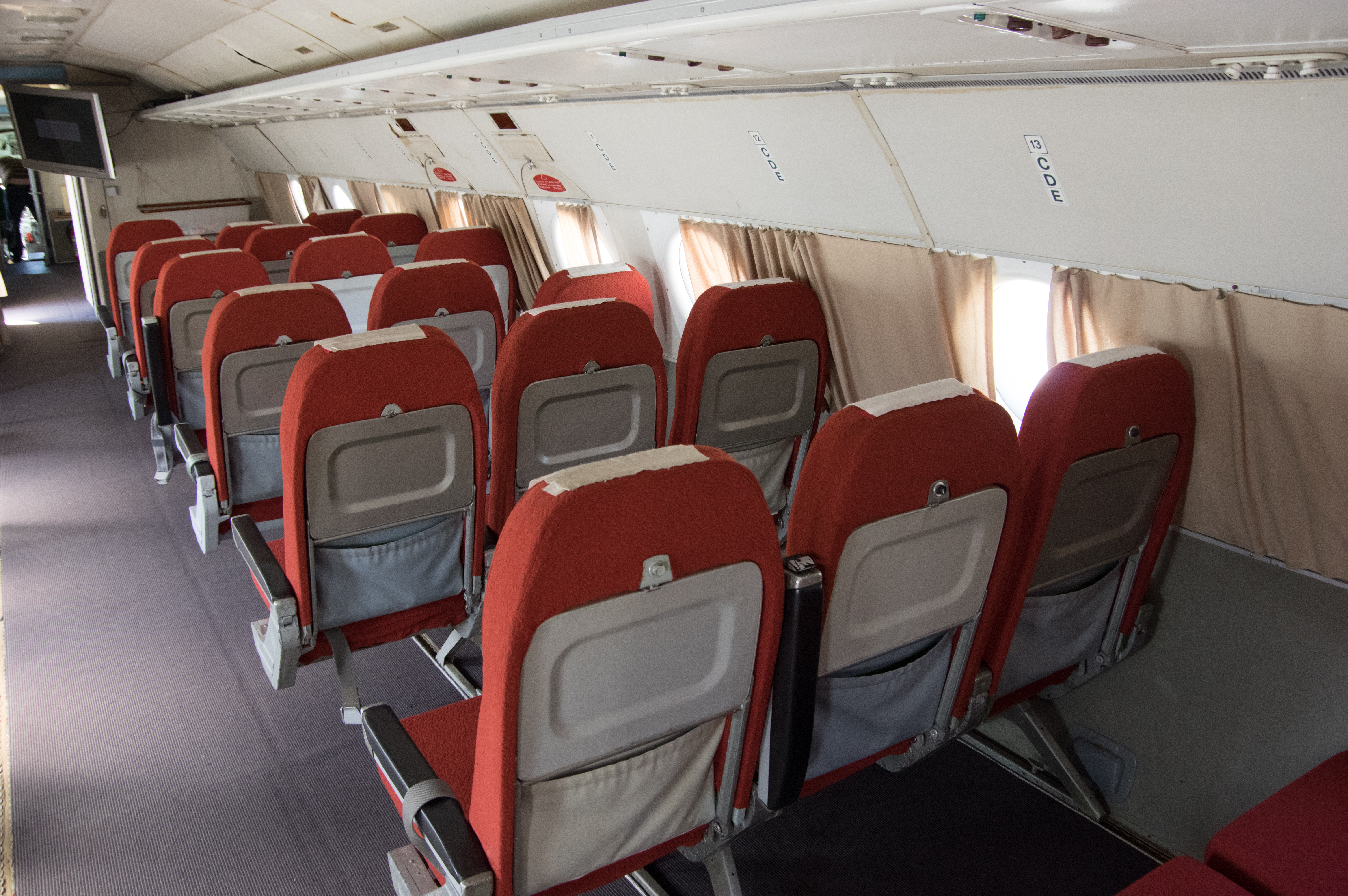 Borkheide in Brandenburg. Die Il 18 im Hans-Garde-Museum in Borkheide steht unter Denkmalschutz.